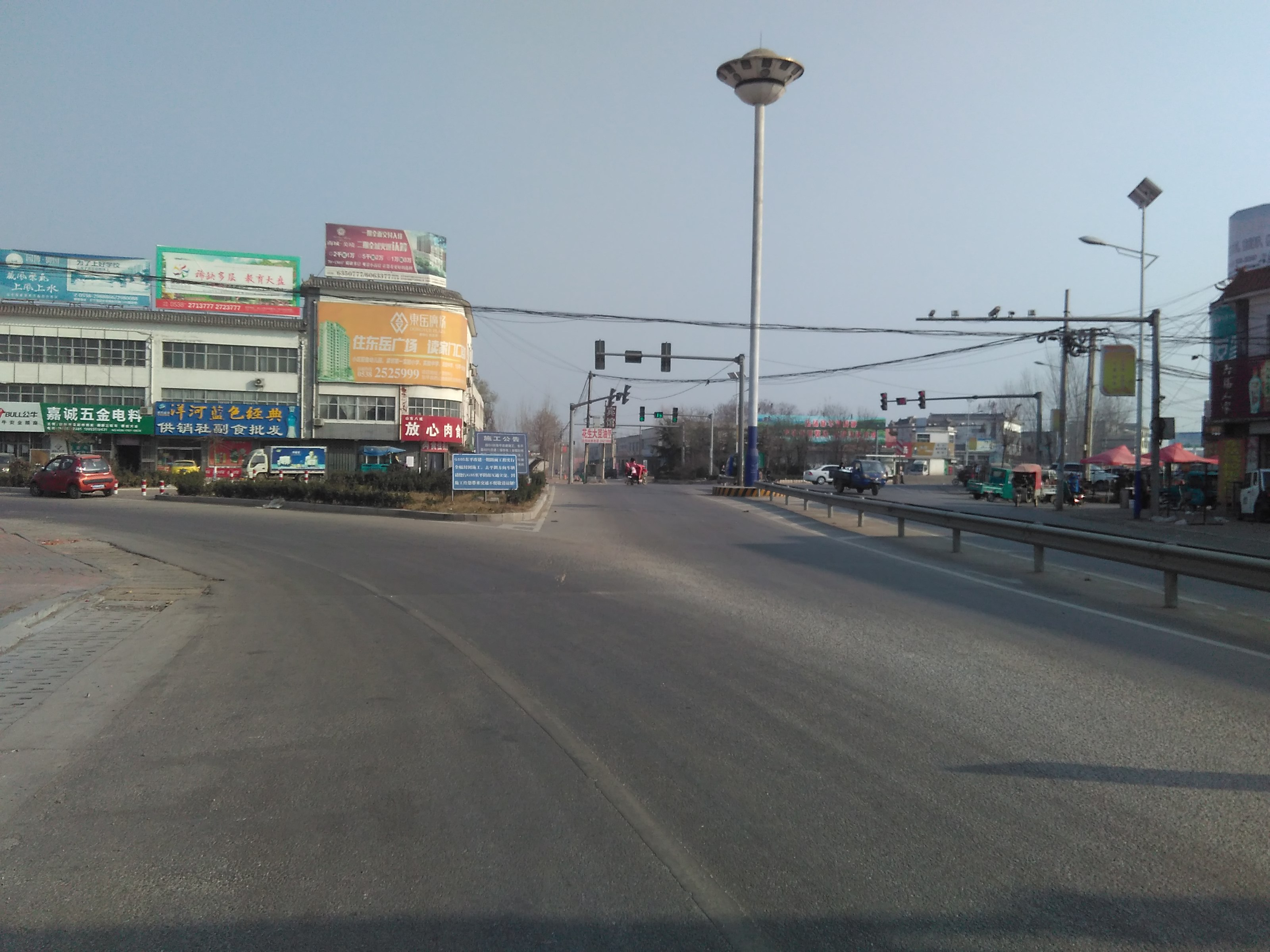 東平縣彭集街道